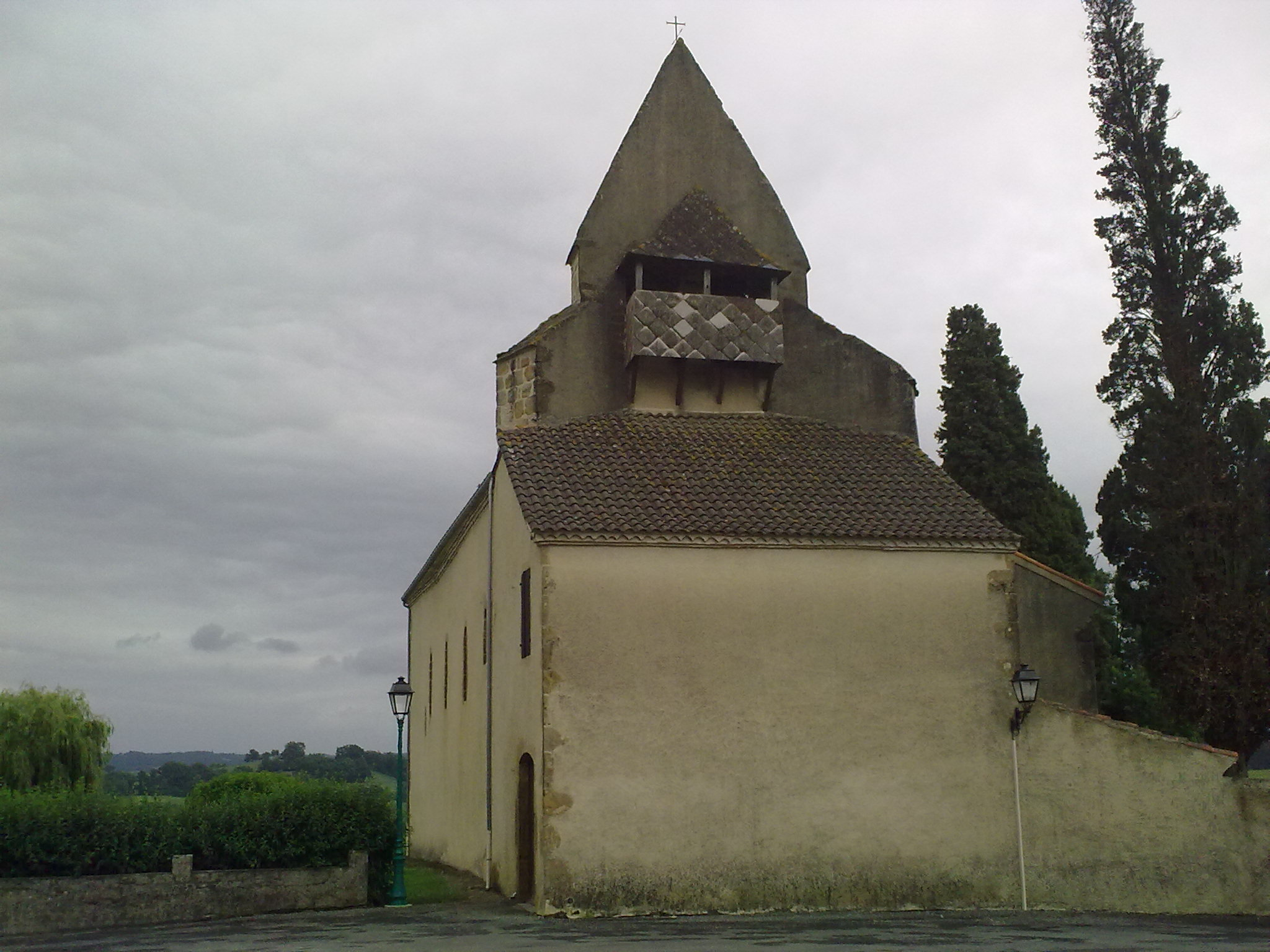 Aydie